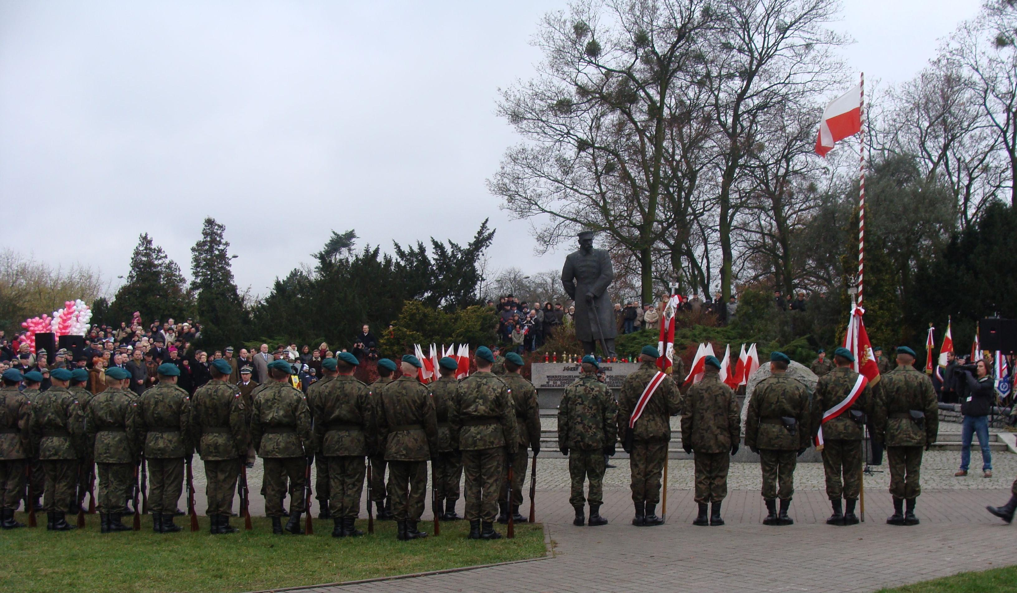 Obchody Święta Niepodległości w Toruniu